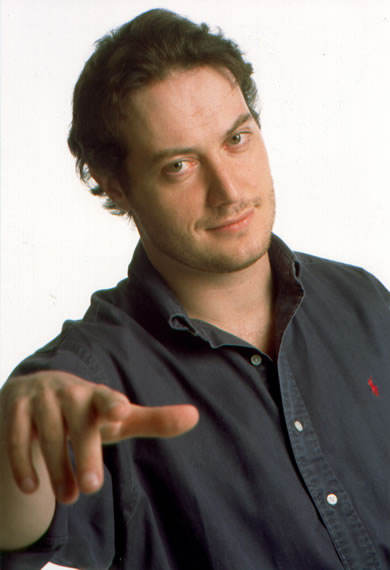 Il comico italiano Corrado Guzzanti.